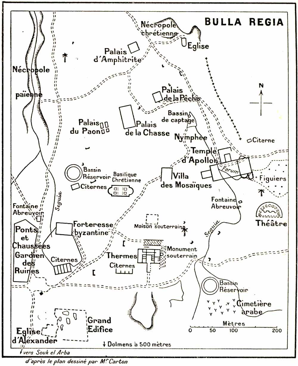 Plan des ruines de Bulla Regia